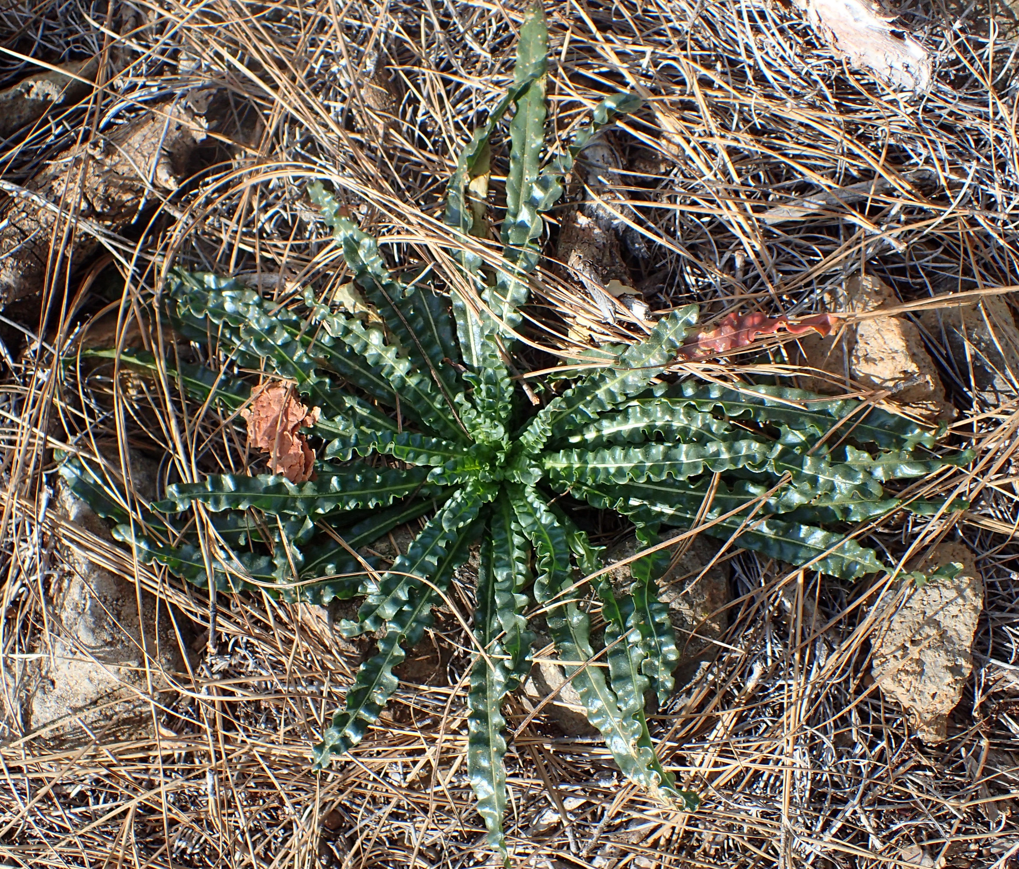 Reseda luteola in Acevino, Tenerife, Canary Islands